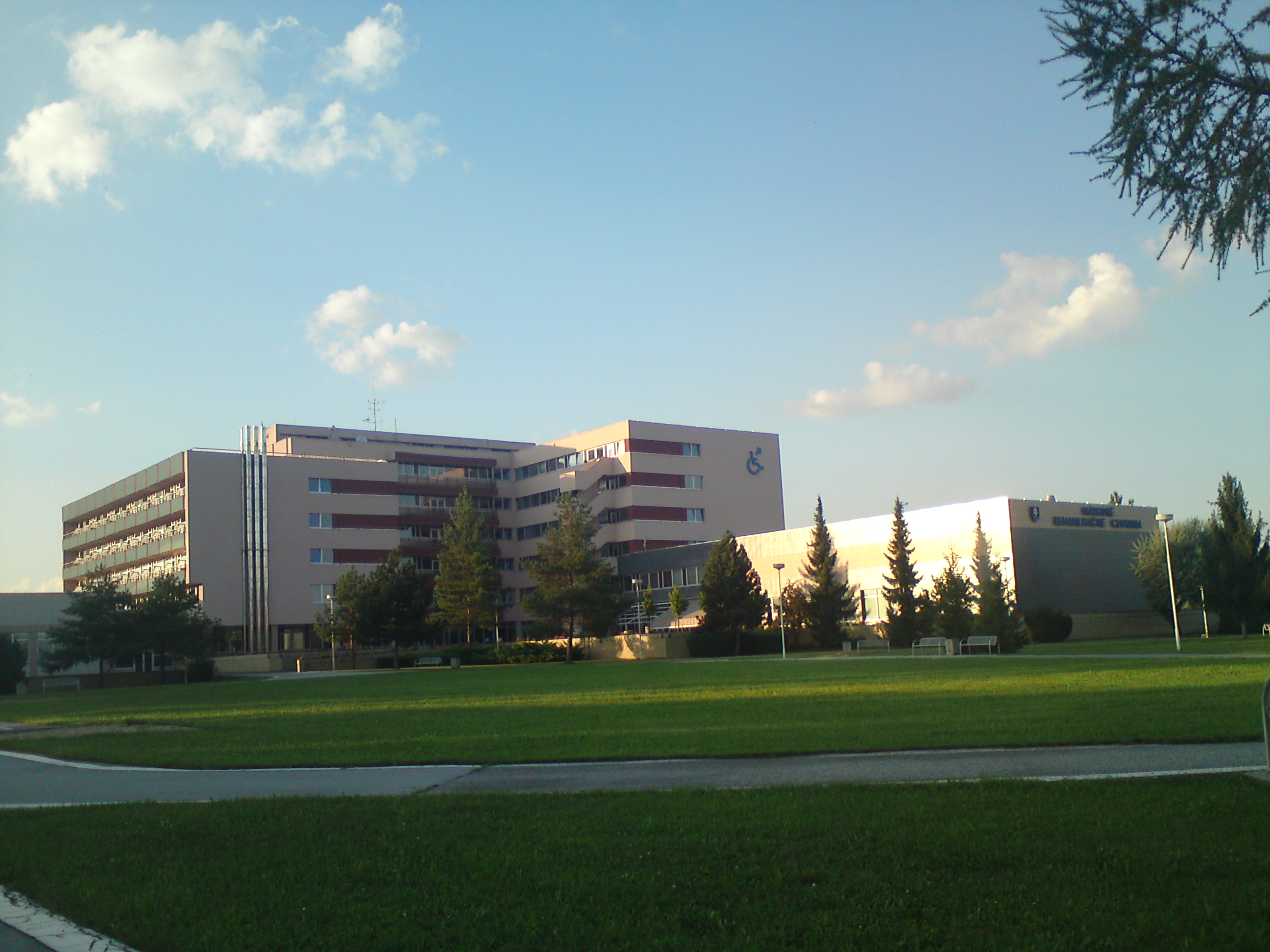 Celkovy pohlad na zariadenie